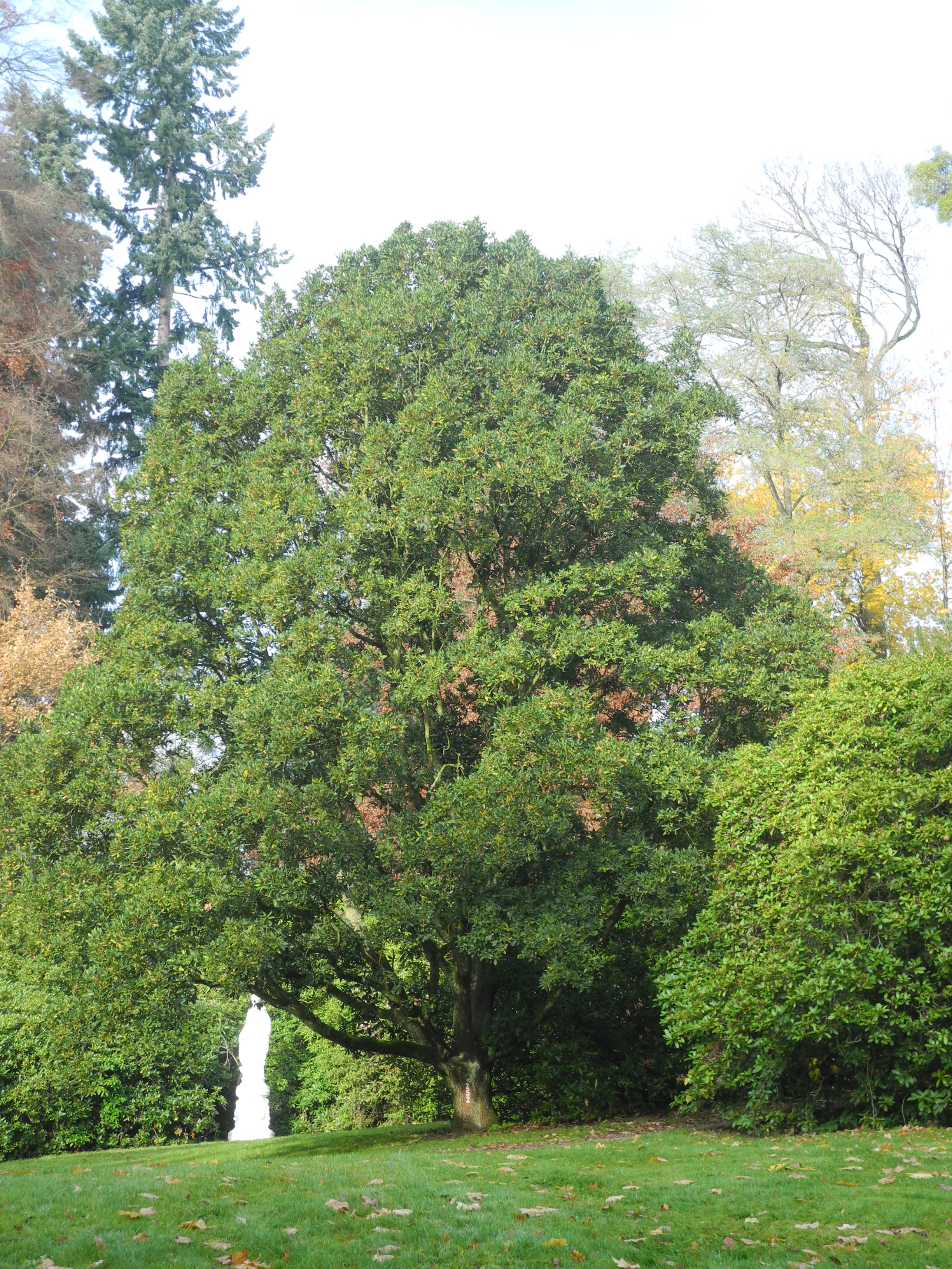 Der Baum mit der Kennung 252 im Bergpark Wilhelmshöhe in Kassel, Hessen, Deutschland. Art: Immergrüne Eiche (Quercus x turneri) Standort: ca. 100 m südwestlich von Schloss Wilhelmshöhe, im Tal der Flora, nördlich der Jussow-Kaskade.